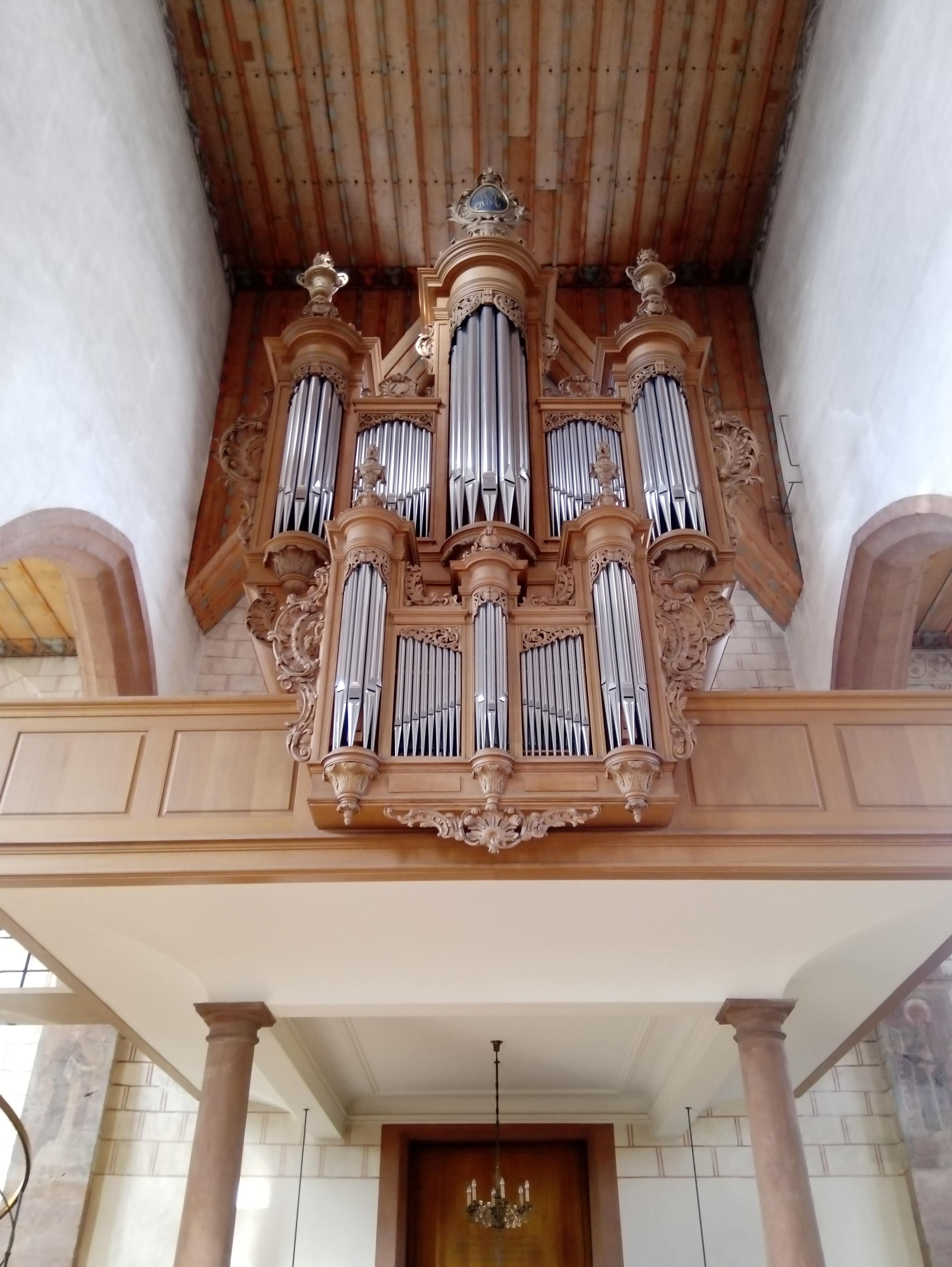 Orgel von Johann Andreas Silbermann in der Basler Predigerkirche